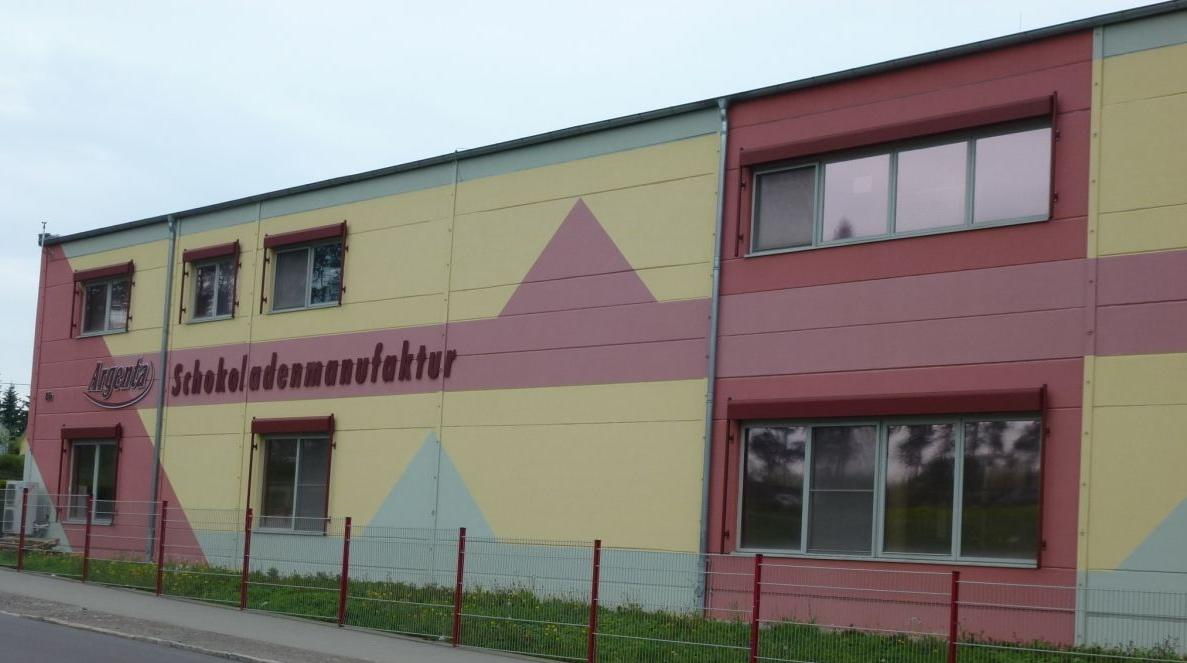 Argenta-Manufaktur in Weißenfels